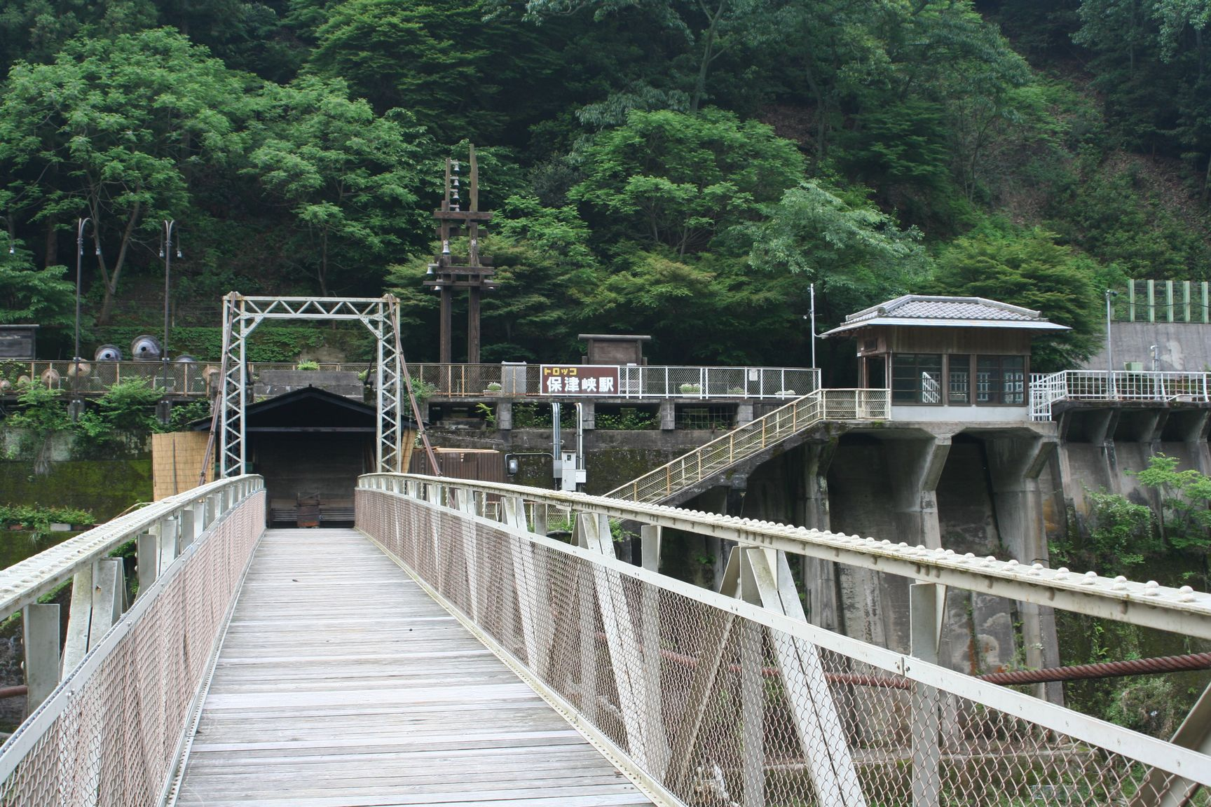 トロッコ保津峡駅